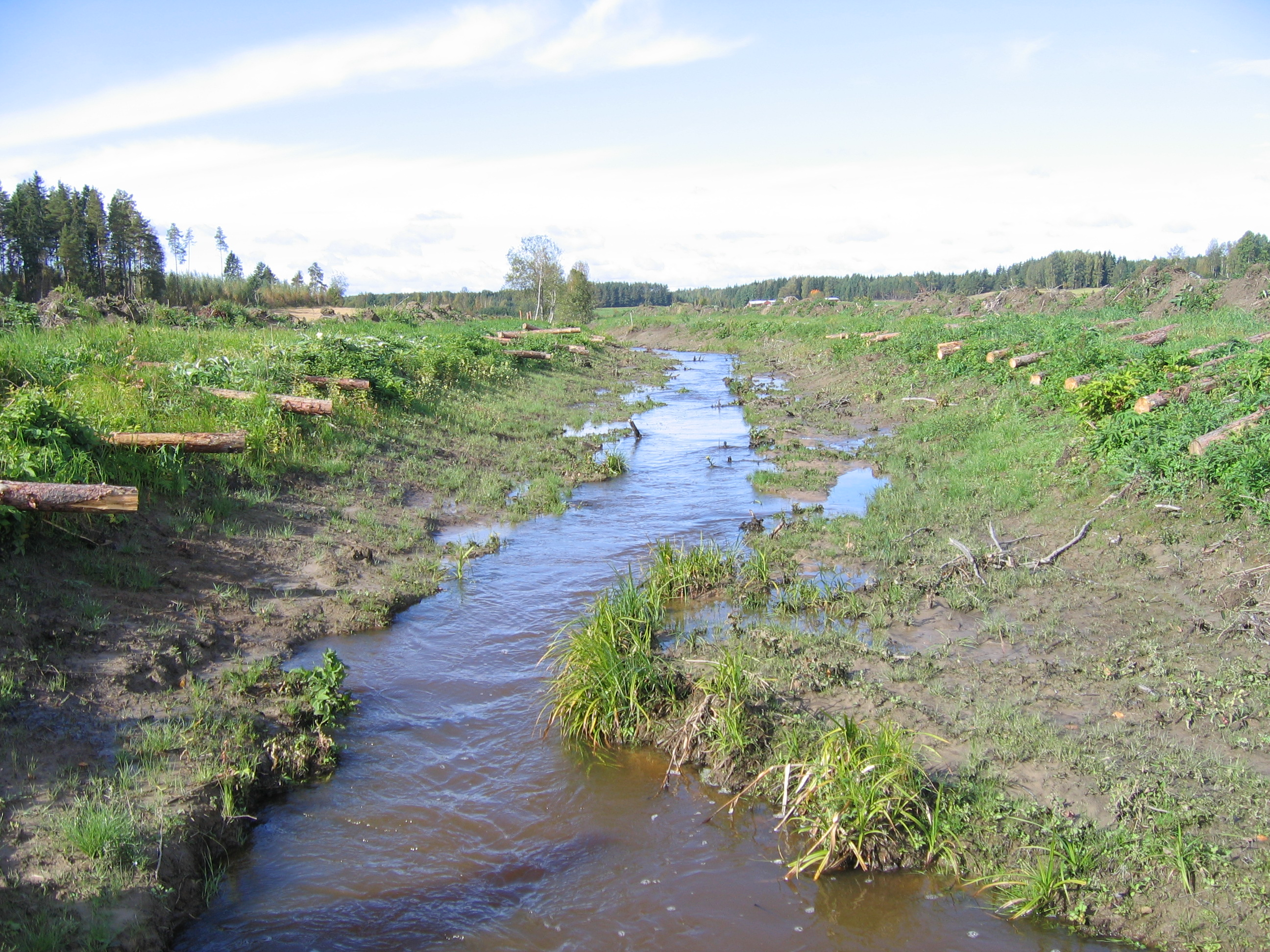 Tulvatasanne